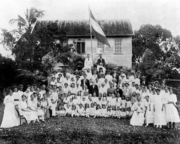 Repronegatief. Op 21 juni 1845 komt het eerste schip met Groningse boeren immigranten binnen in Suriname, de Susanna Maria.. Groep Nederlandse kolonisten op de boerderij van de heer van Brussel ter gelegenheid van het herdenkingsfeest op 21 juni 1920